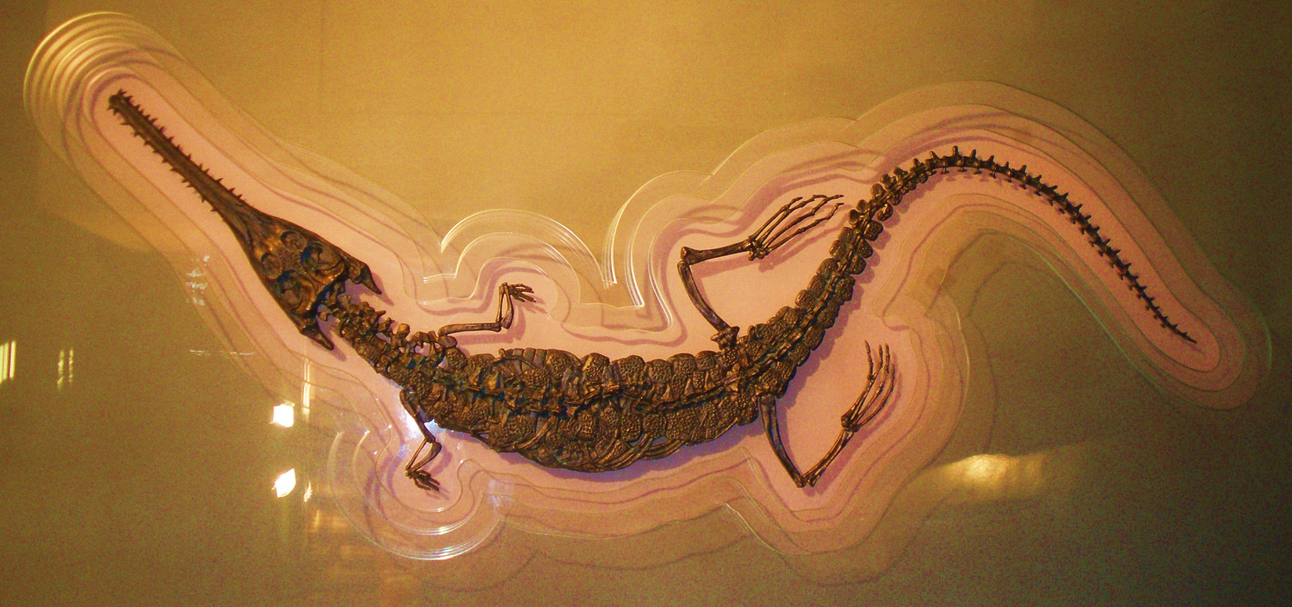 Fossil of Steneosaurus, an extinct reptile- Took the photo at Fossil Show, Munchen 2011